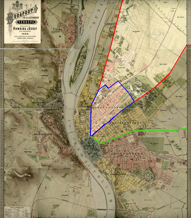 Homolka József 1893-as Budapest térképe alapján. Budapest, Terézváros (VI. ker) kiemelve 1873 előtt (piros+zöld keret) 1893-ban (piros keret) 2006 (kék keret)